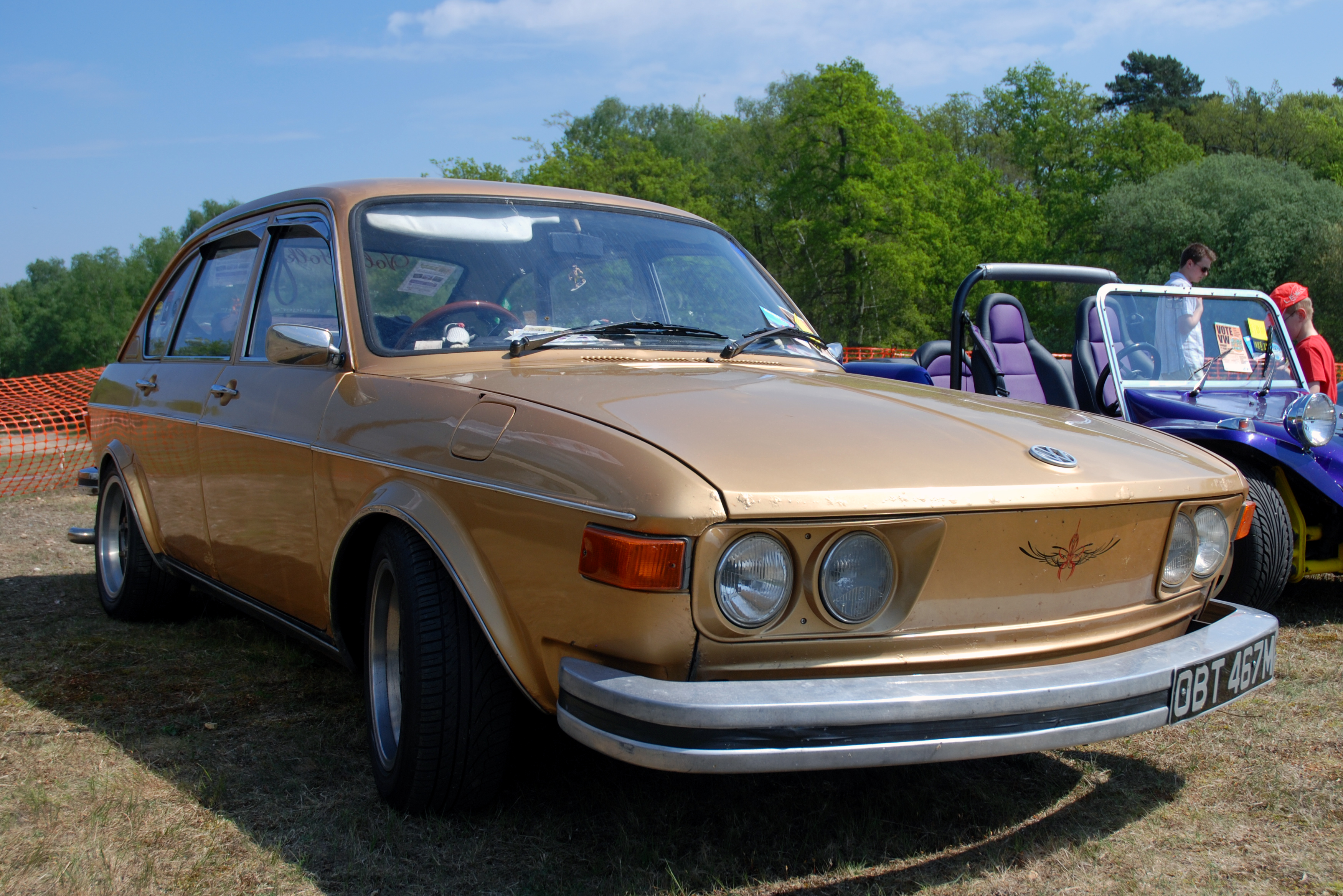 Wheels 2011,April 2011